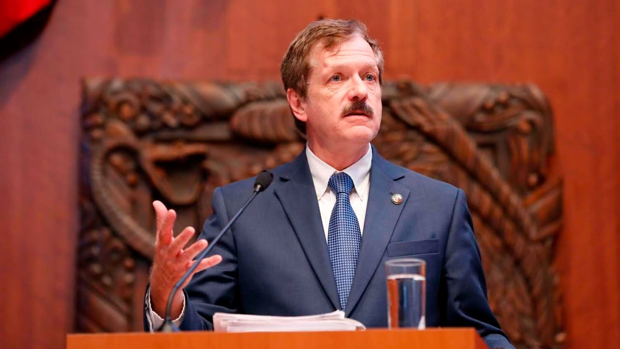 SJCRH